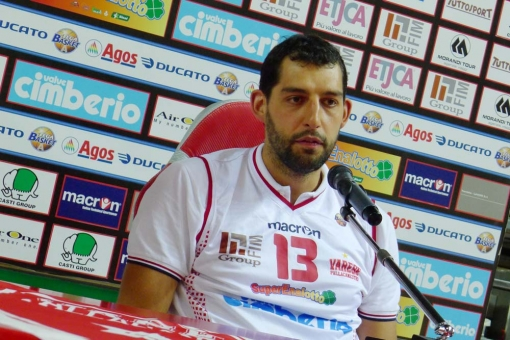 Il cestista italiano Luca Garri